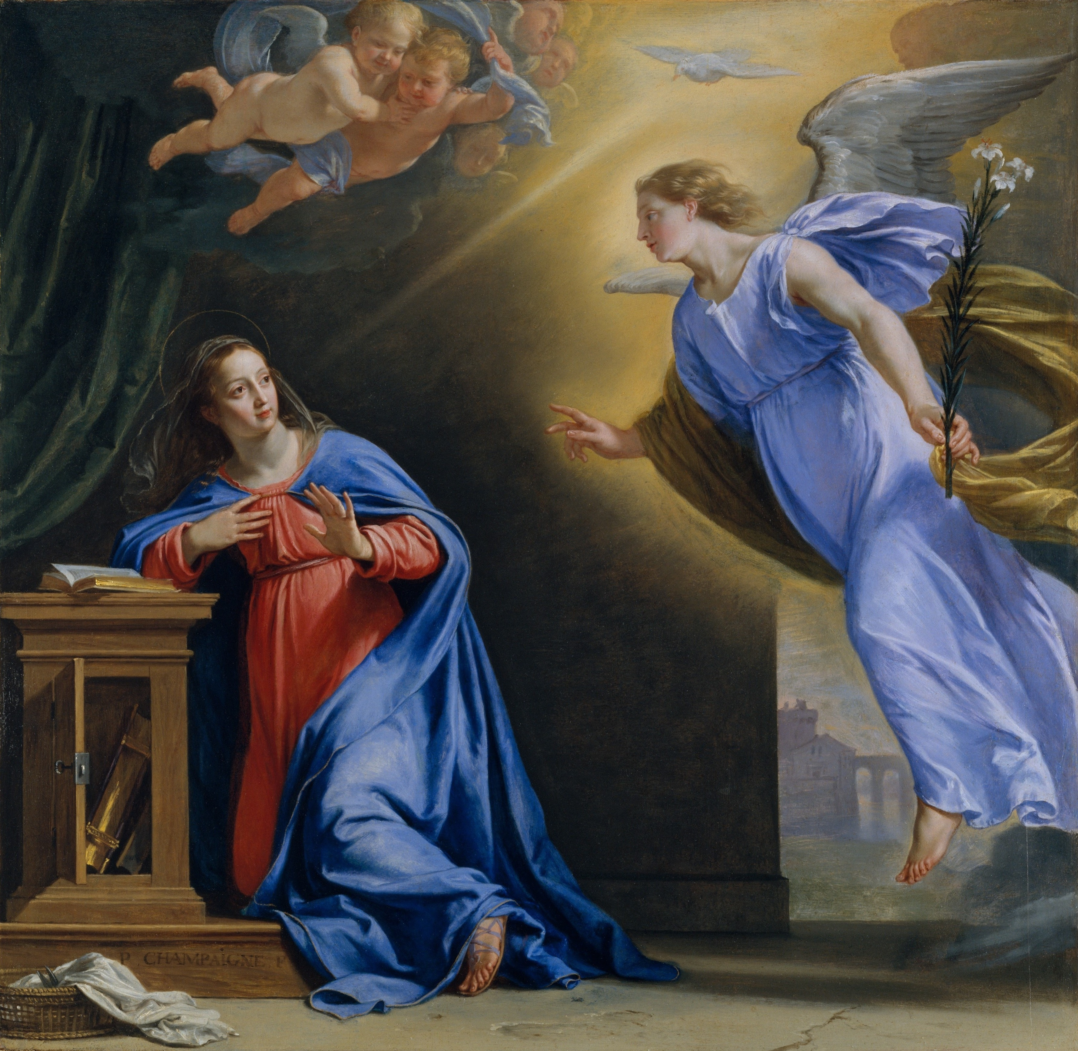 L'Annonciation